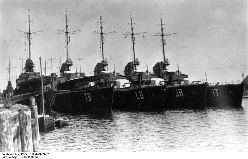 Torpedoboot-Flottille vor Anker Torpedoboot-Flottille. Torpedoboote Typ 24, "Raubtier-Klasse".- "Tiger" (TG), "Luchs" (LU), "Jaguar" (JA), "Iltis" (IT) vor Anker